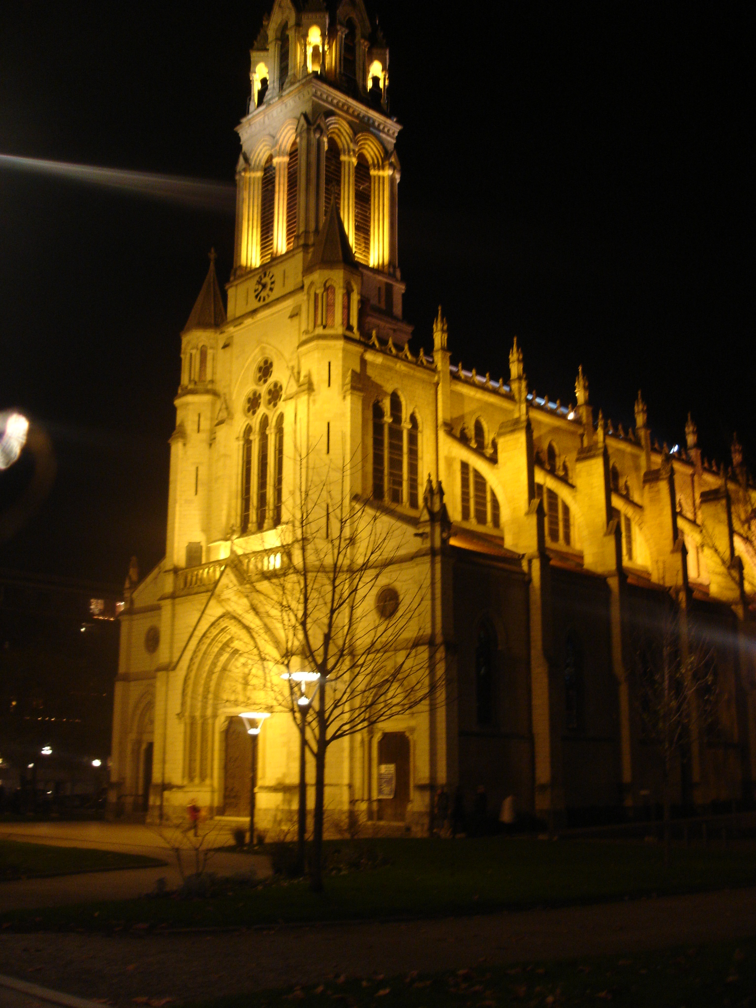 Lyon-Perrache : église Sainte-Blandine